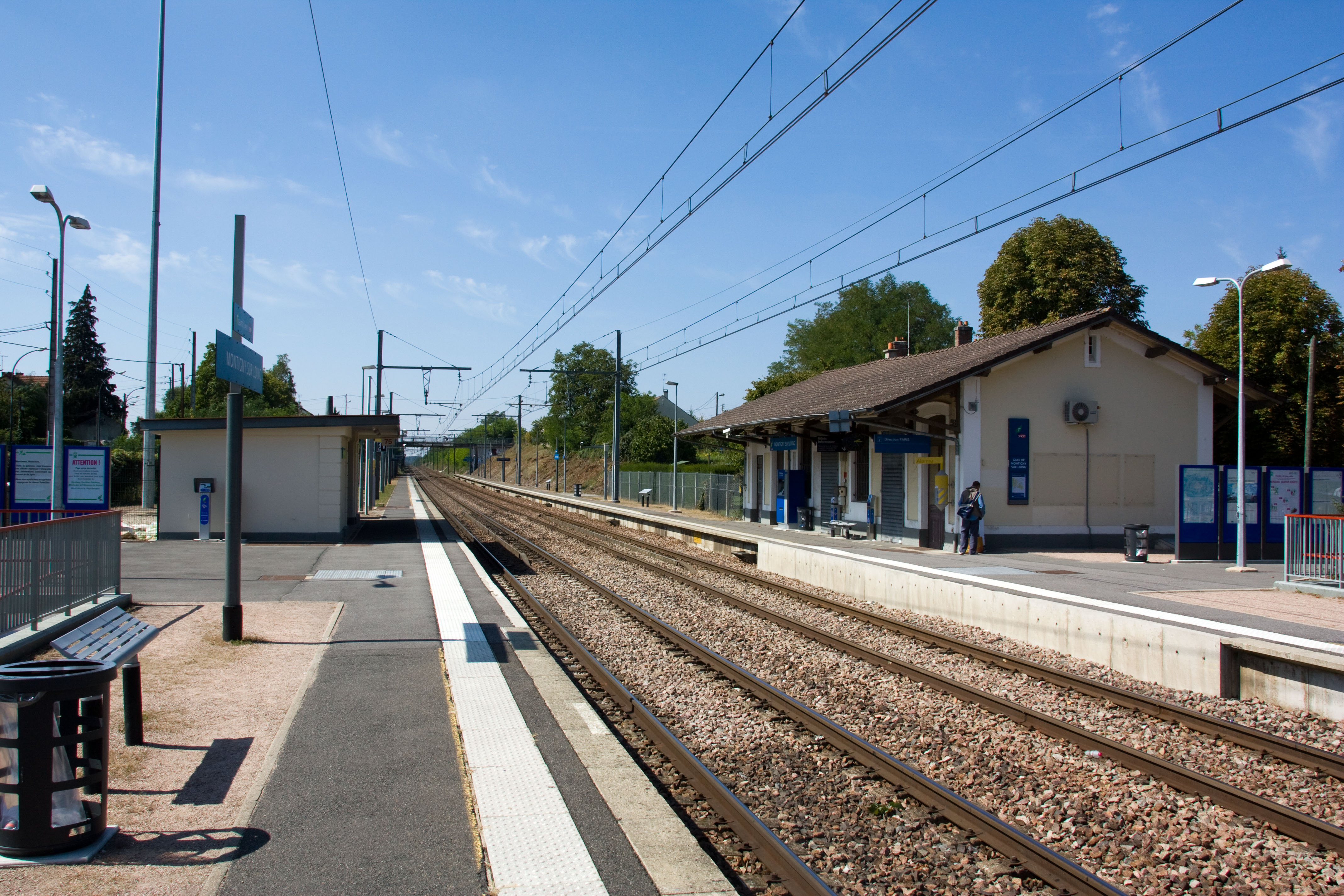 Gare de Montigny-sur-Loing. Montigny-sur-Loing, Seine-et-Marne, France.